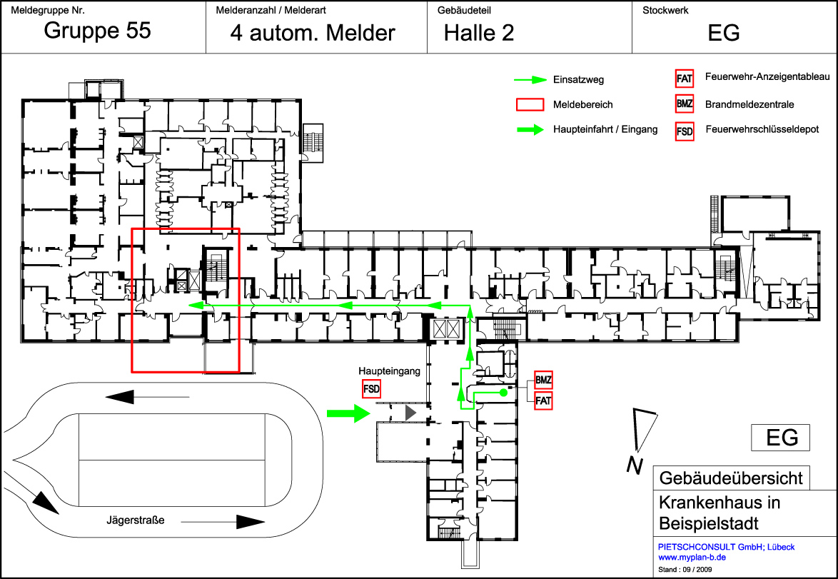 Muster eines Feuerwehreinsatzplanes (Geschossplan)